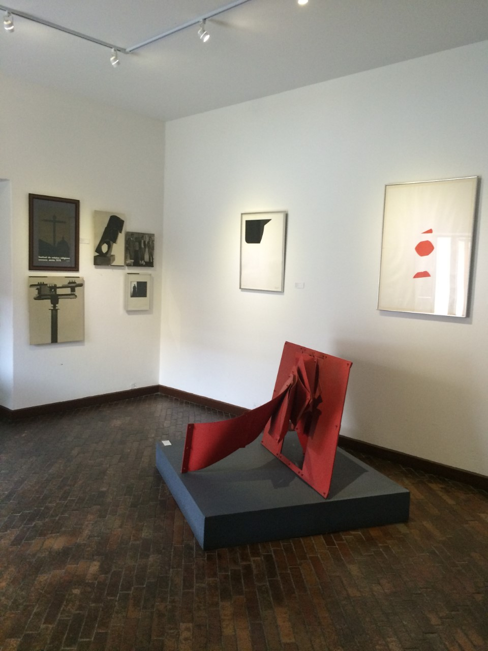 Casa Negret - Museo Iberoamericano de Arte Moderno Popayán